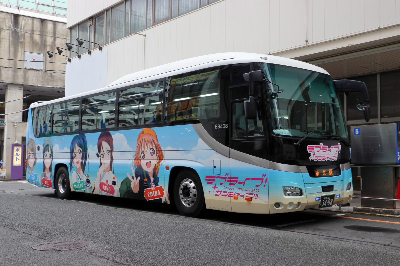 東京駅 - 沼津線（富士急シティバス）E3408号車 「ラブライブ!サンシャイン!!」ラッピング車両